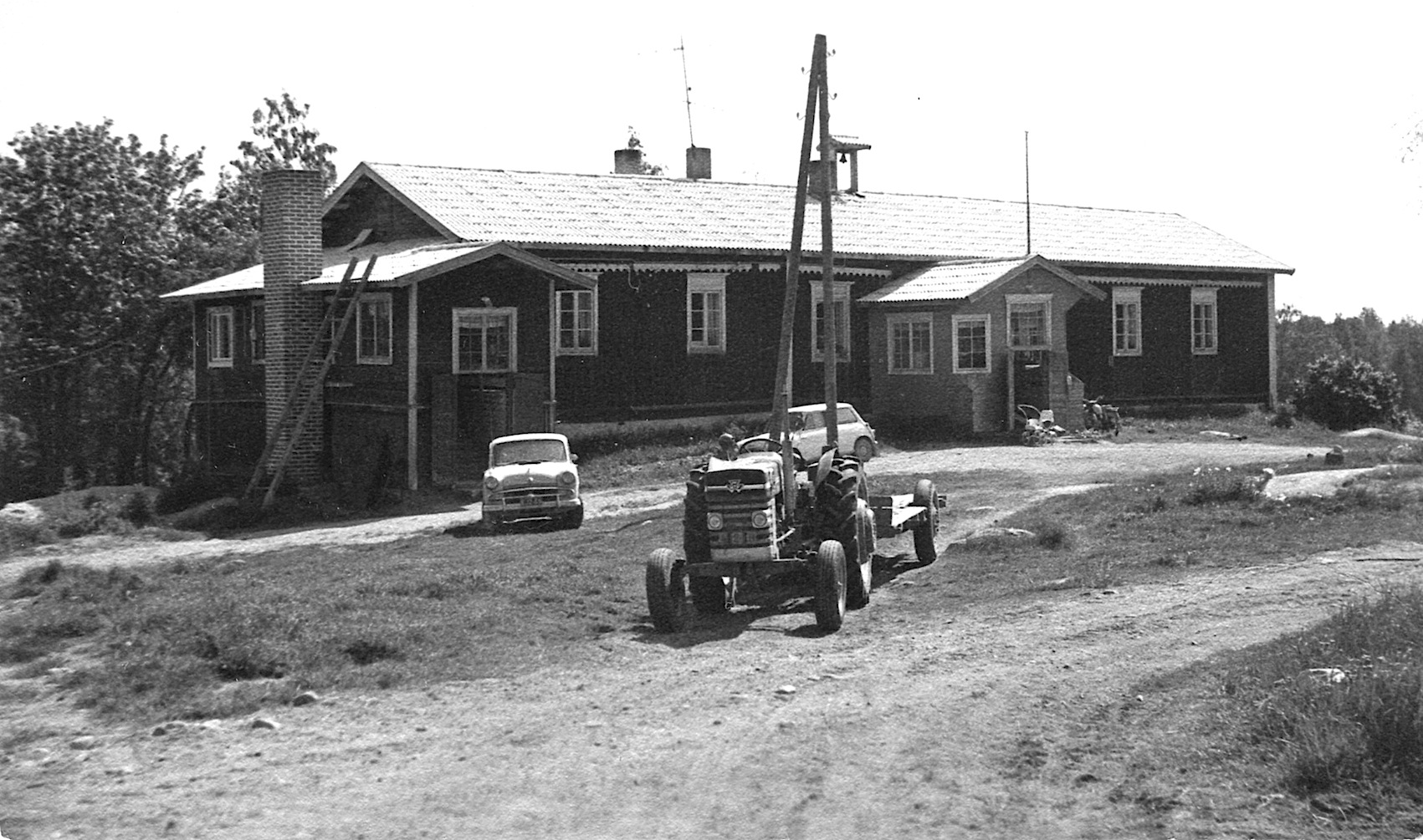 Lannetta, Parkano Aurejärvi.